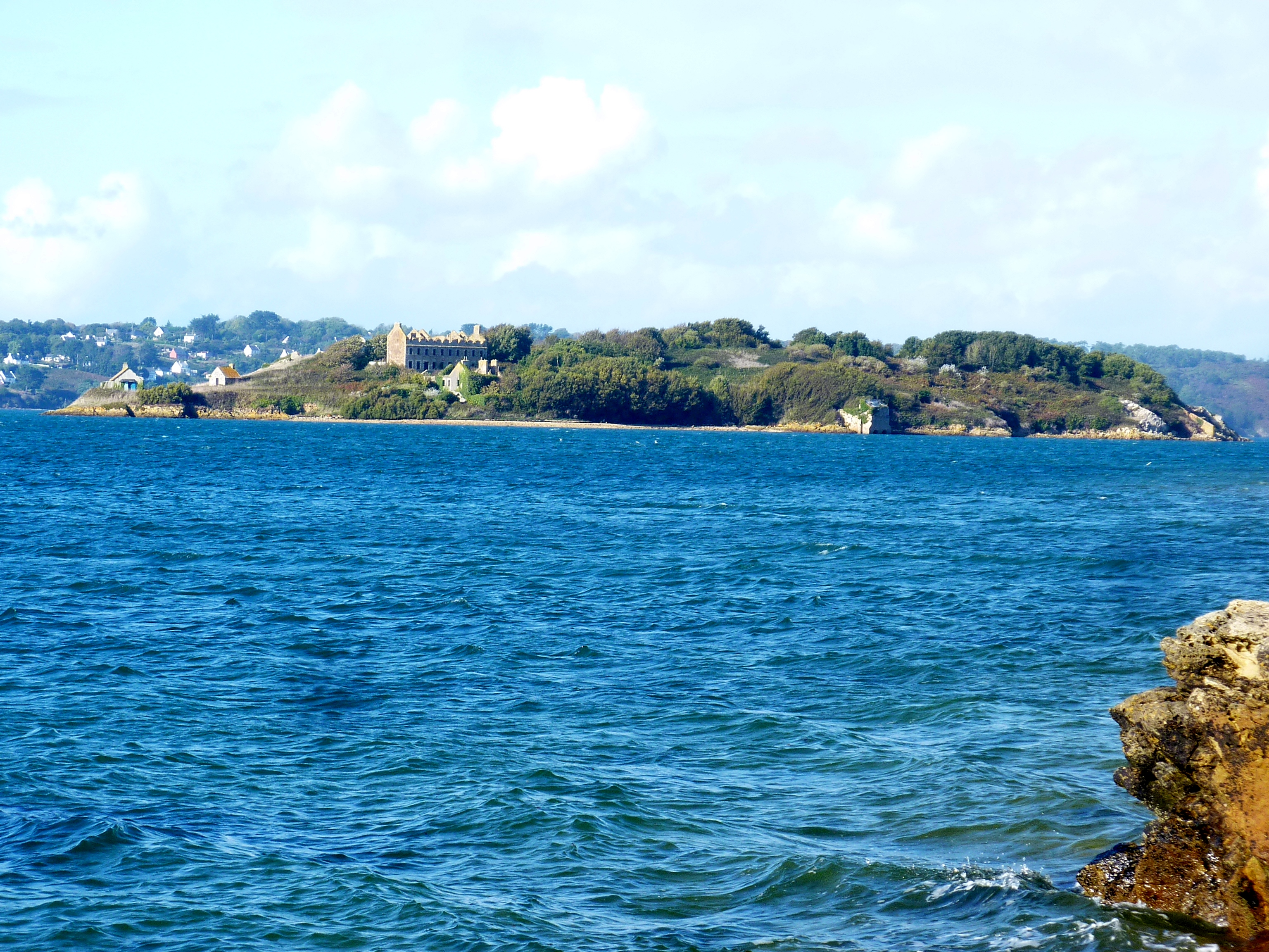 L'Île Trébéron et son lazaret en ruine vus depuis Rostellec (Rostellec est situé dans la presqu'île et la commune de Crozon)